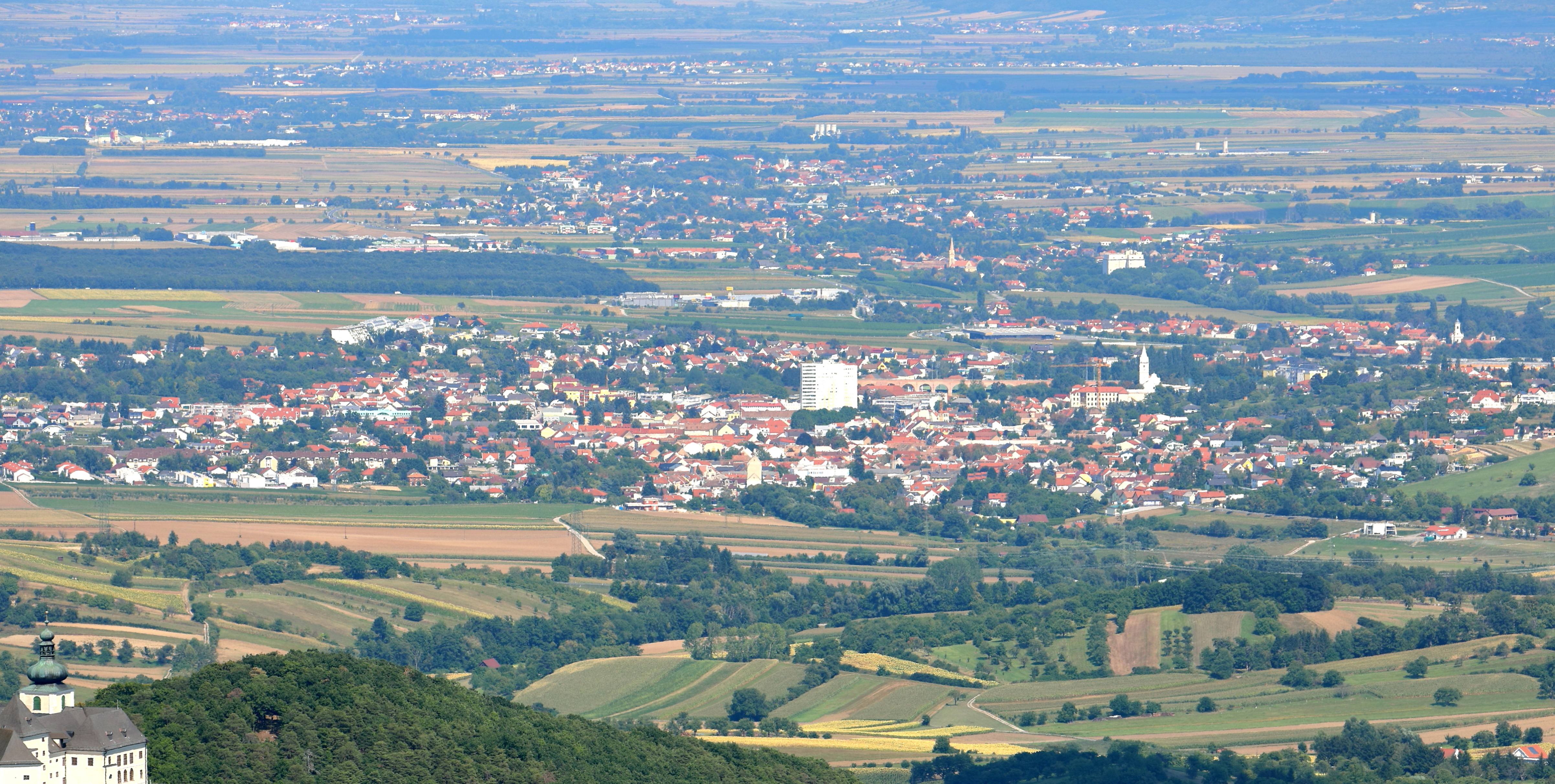 Fernansicht vom 748 m hohen Heuberg bzw. Südwestansicht der burgenländischen Stadtgemeinde Mattersburg.